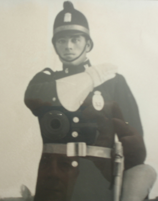 Policía rural de Pamplona en el año 1930